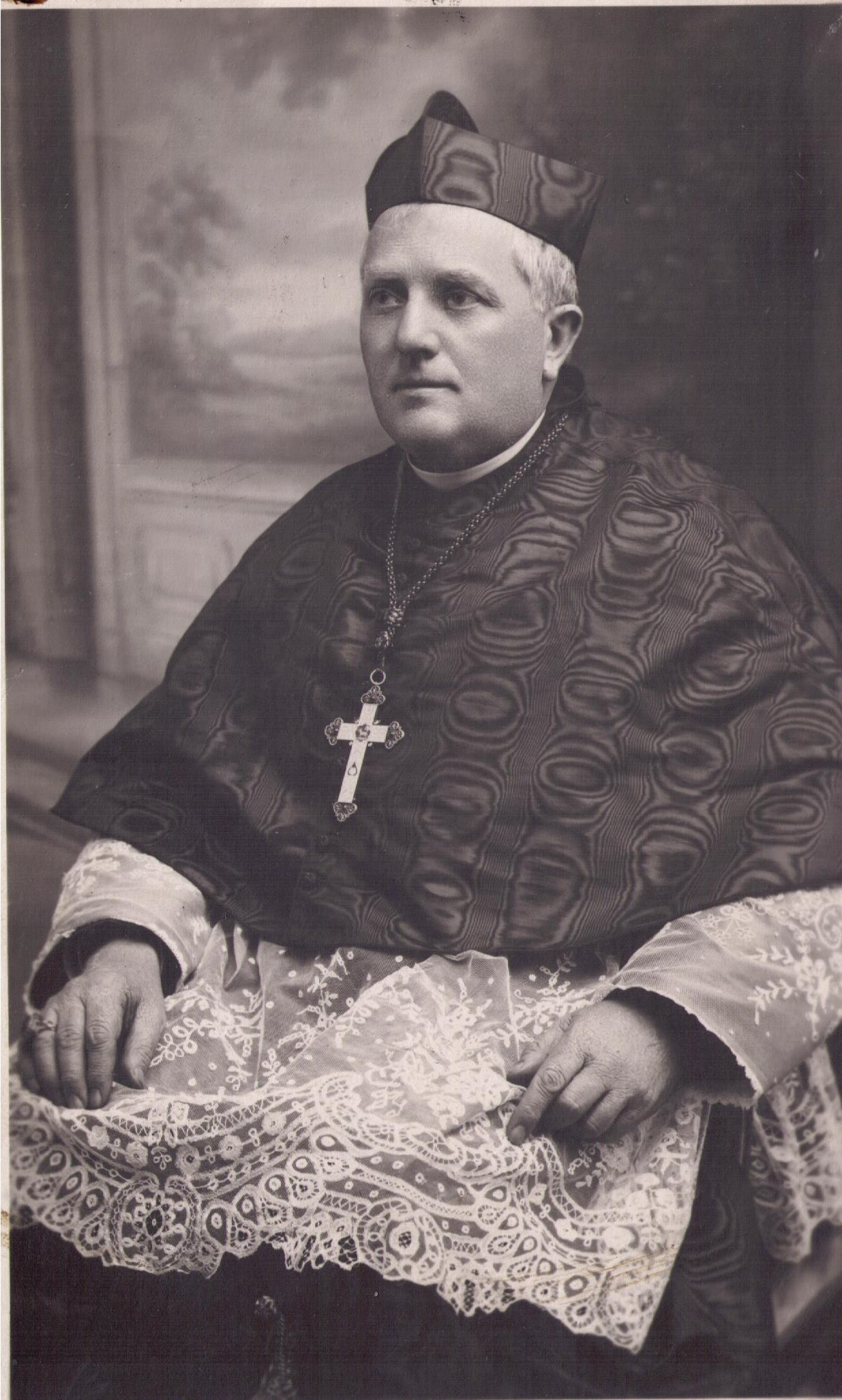 Photo archevêché Besançon